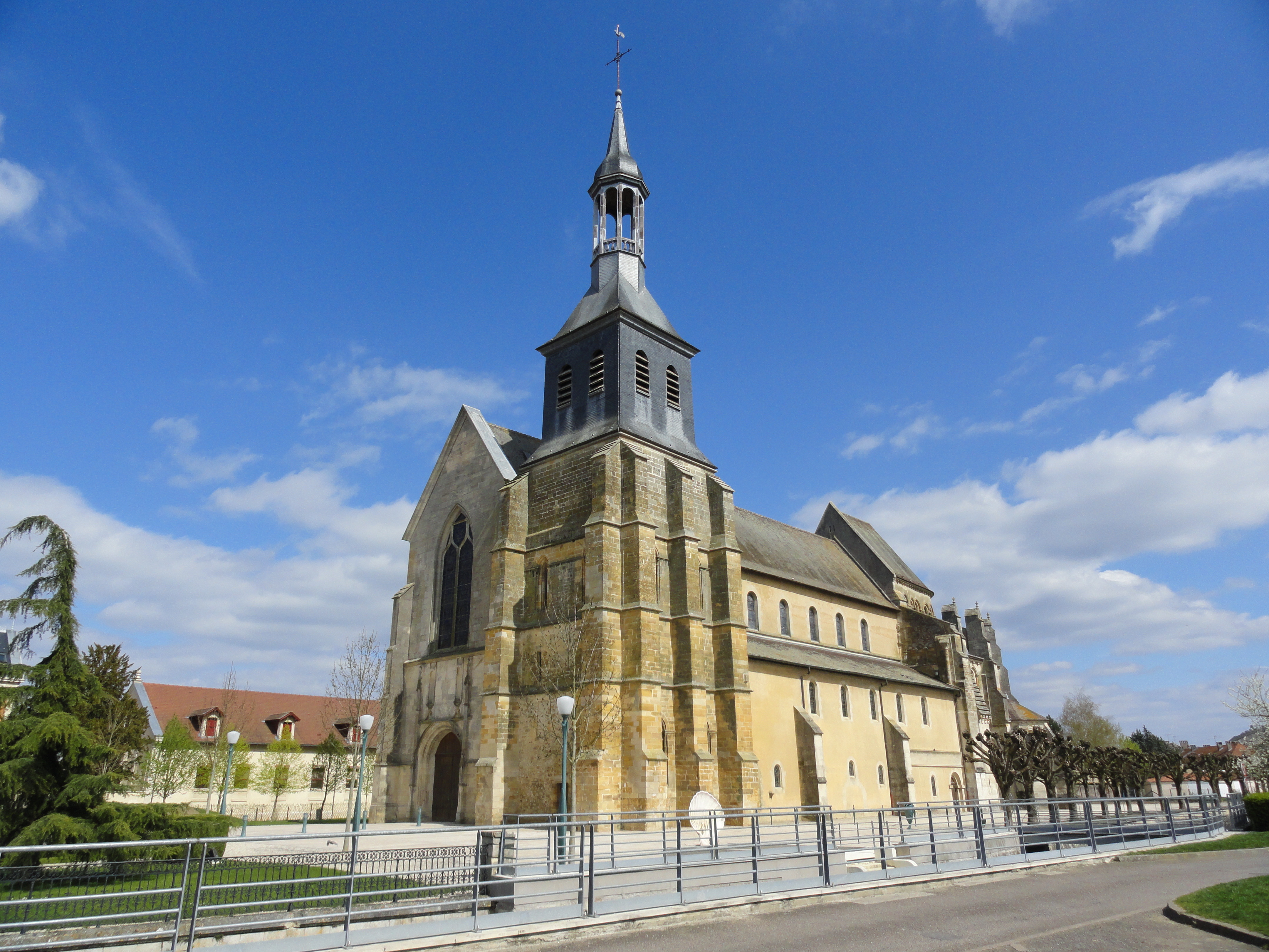 Abbatiale Saint-Pierre-et-Saint-Paul de Montier-en-Der